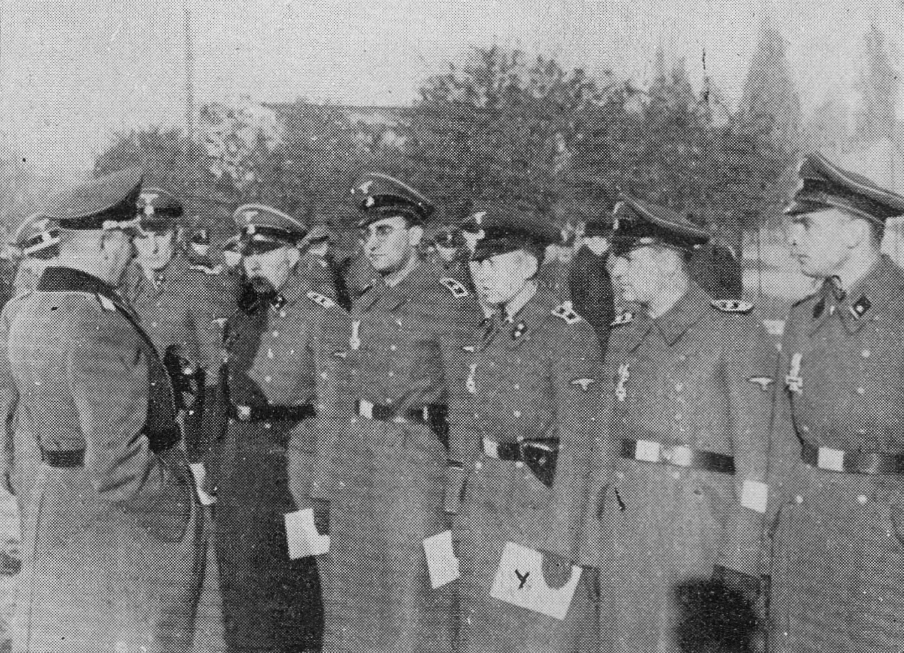 Funkcjonariusze Sicherheitspolizei (Sipo) z al. Szucha 25 w Warszawie, trzeci od prawej Feldhaber, sprawujący w latach 1940-1942 nadzór nad więzieniem Pawiak